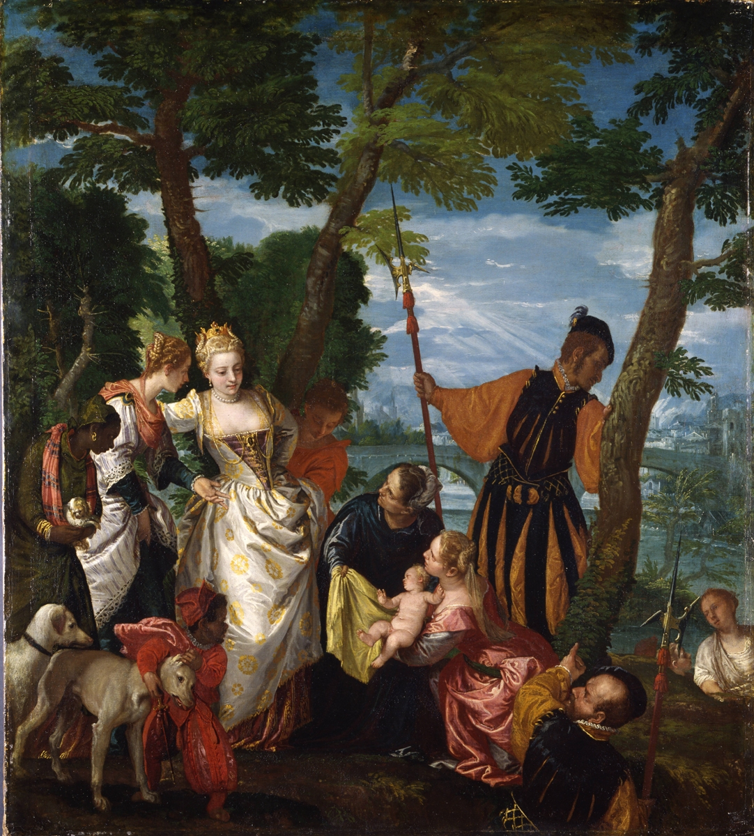 Peinture